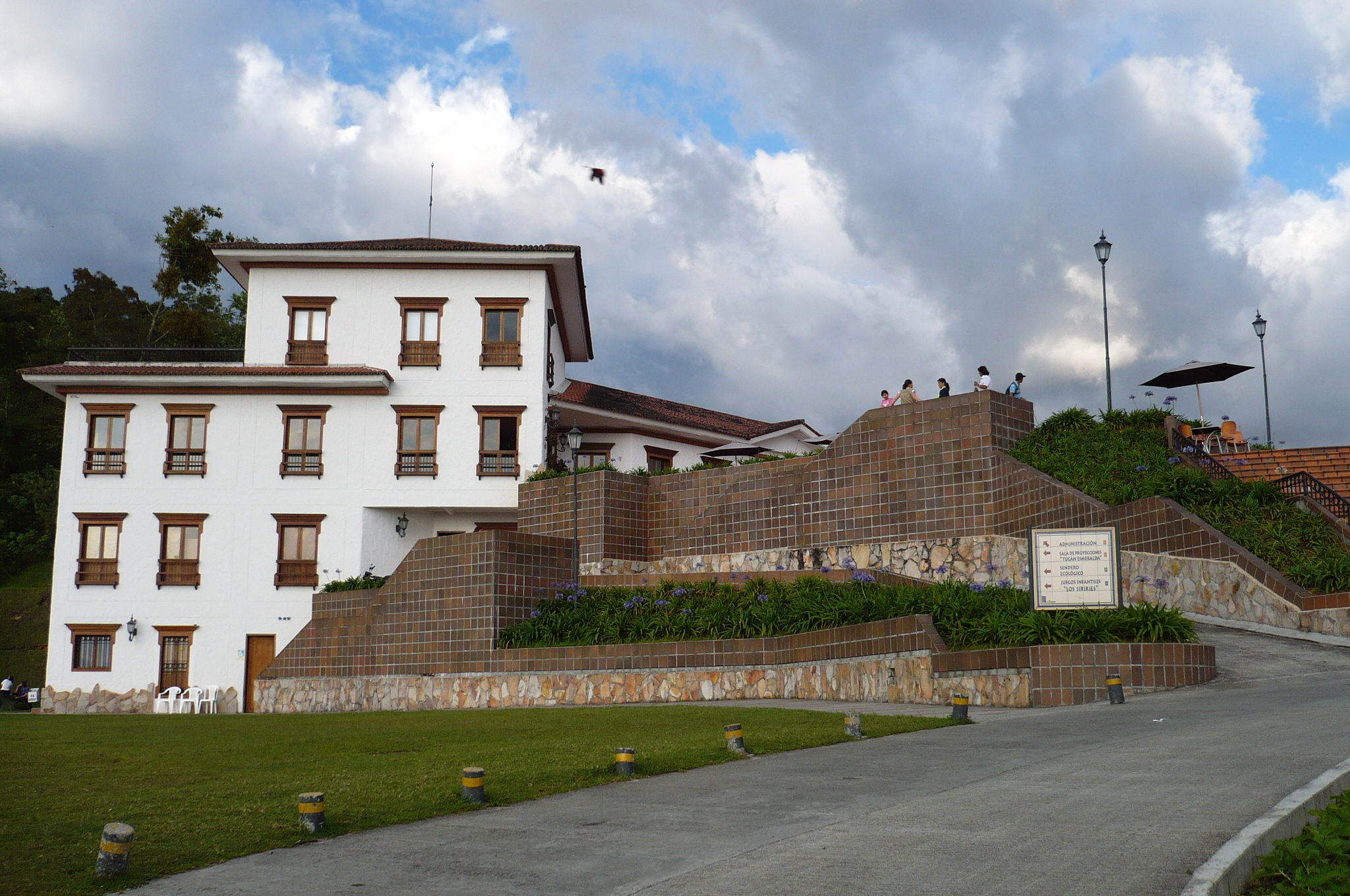 Casa principal del Ecoparque Los Yarumos en Manizales, capital de Caldas